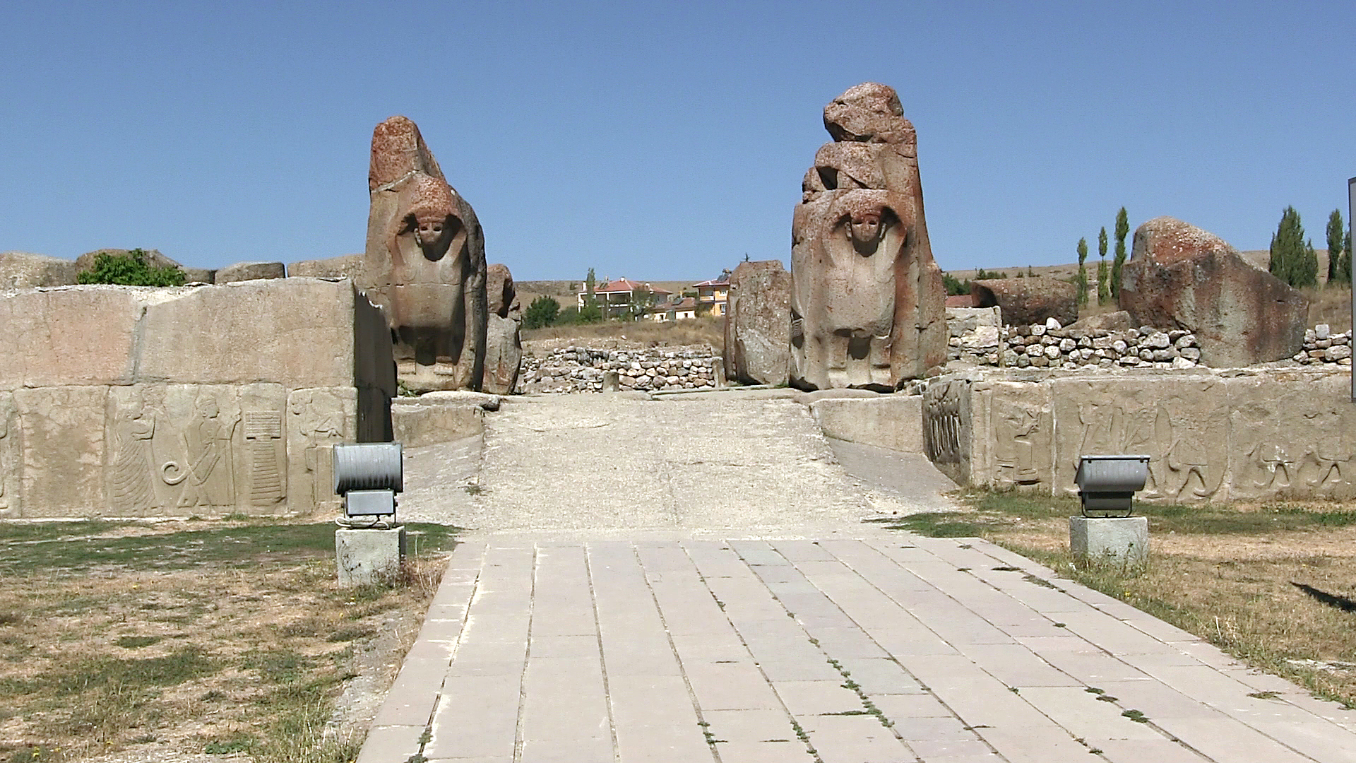 Hethitische Portalsphingen in Alaca Höyük, Türkei